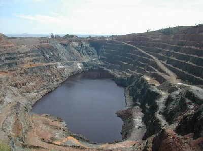 Foto de Sierra Bullones, una de las varias minas a cielo abierto que existen en la localidad.